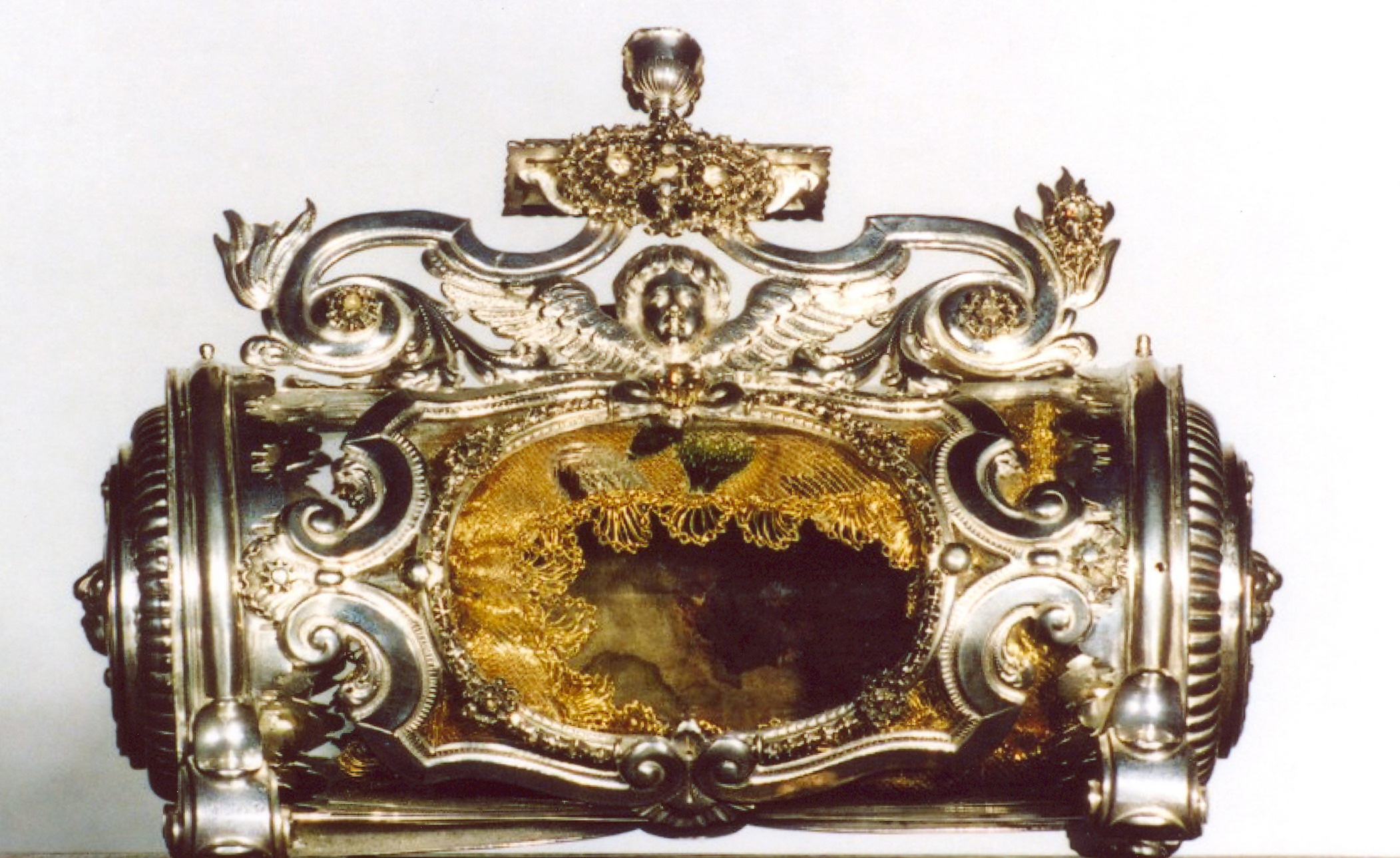 Reliekcylinder Boxmeerse Vaart